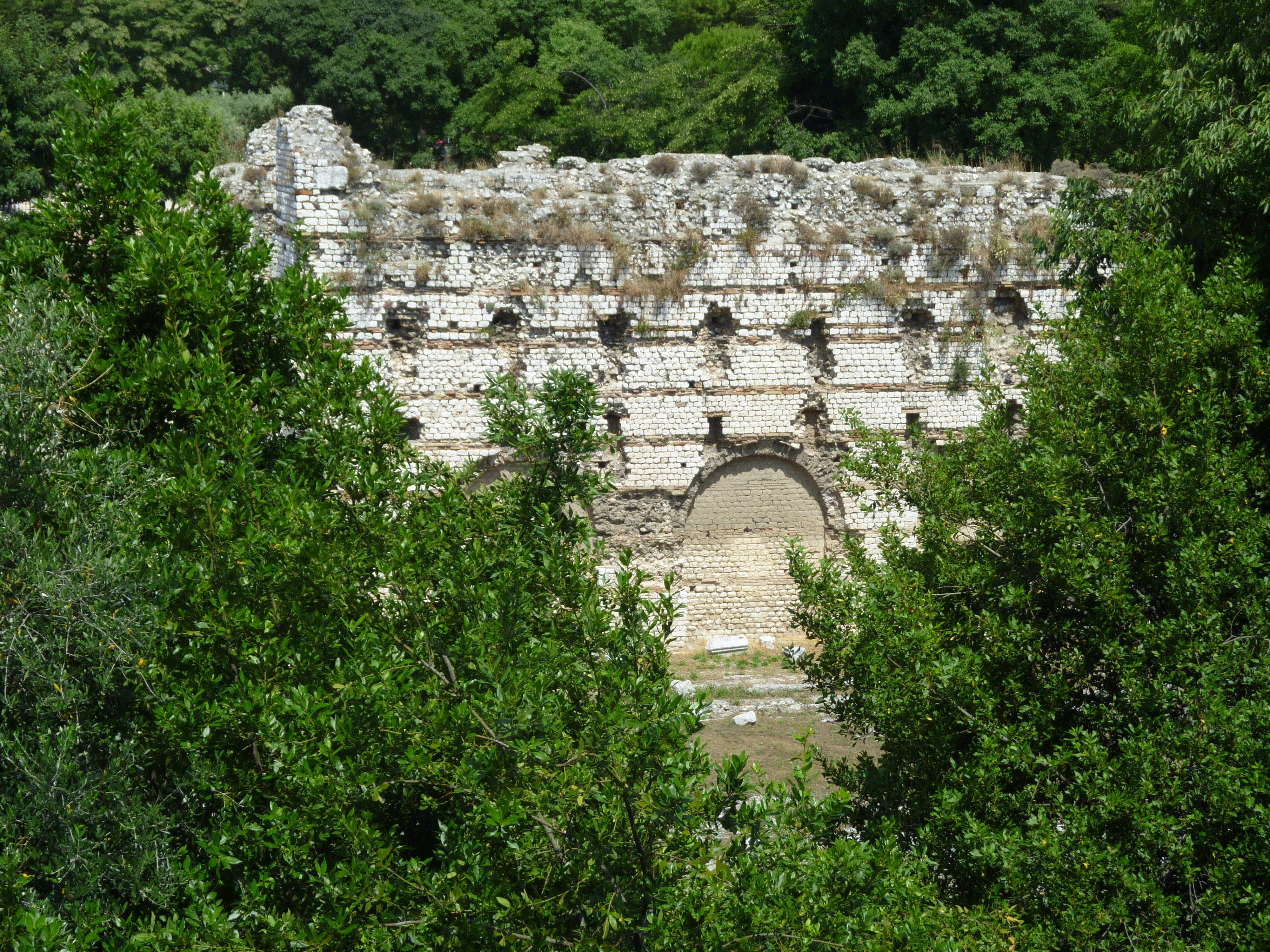 Thermes romains de Cimiez (Nice, Alpes-Maritimes, France) This building is en partie classé, en partie inscrit au titre des Monuments Historiques. .